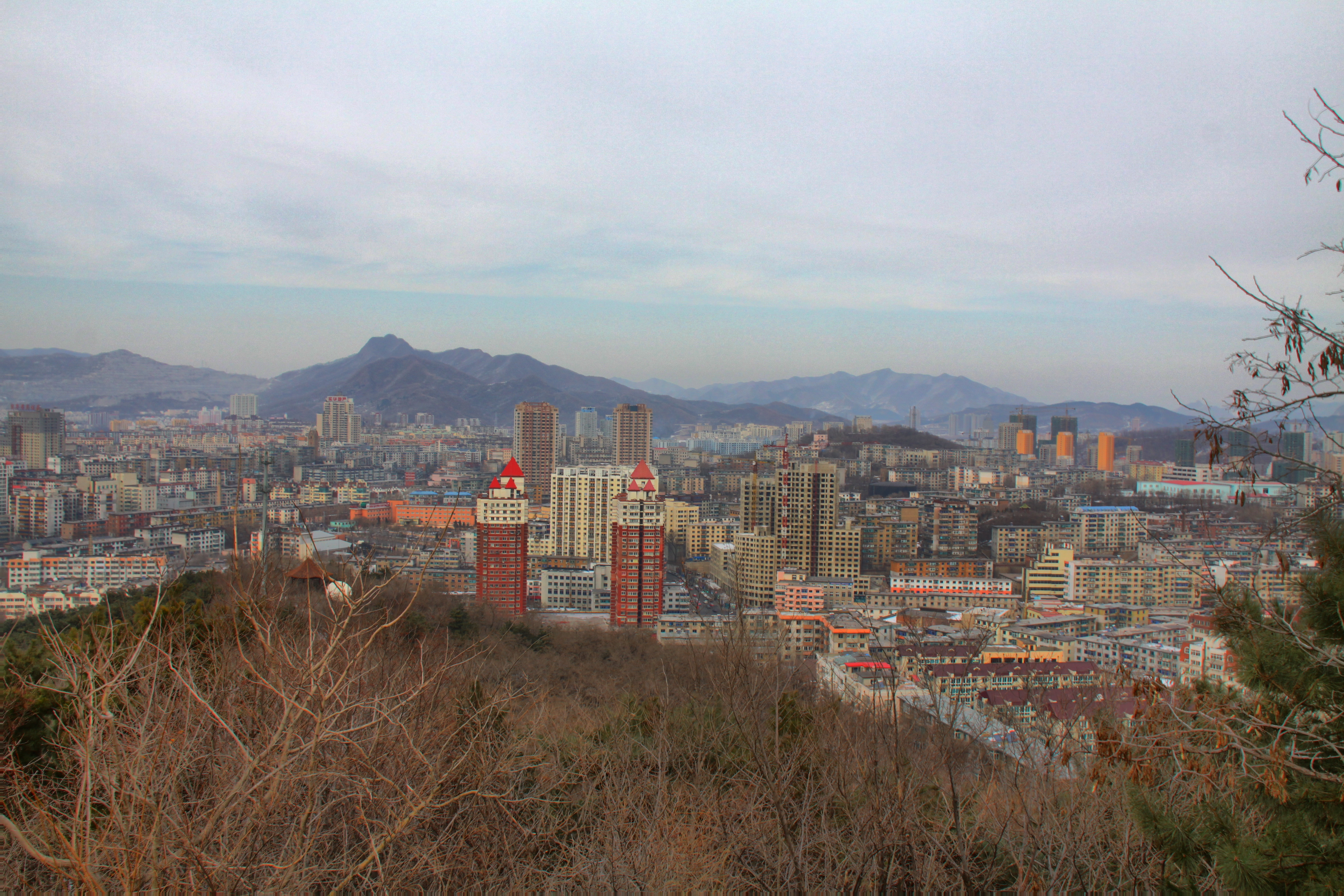 Benxi Blick über die Stadt Richtung Süden